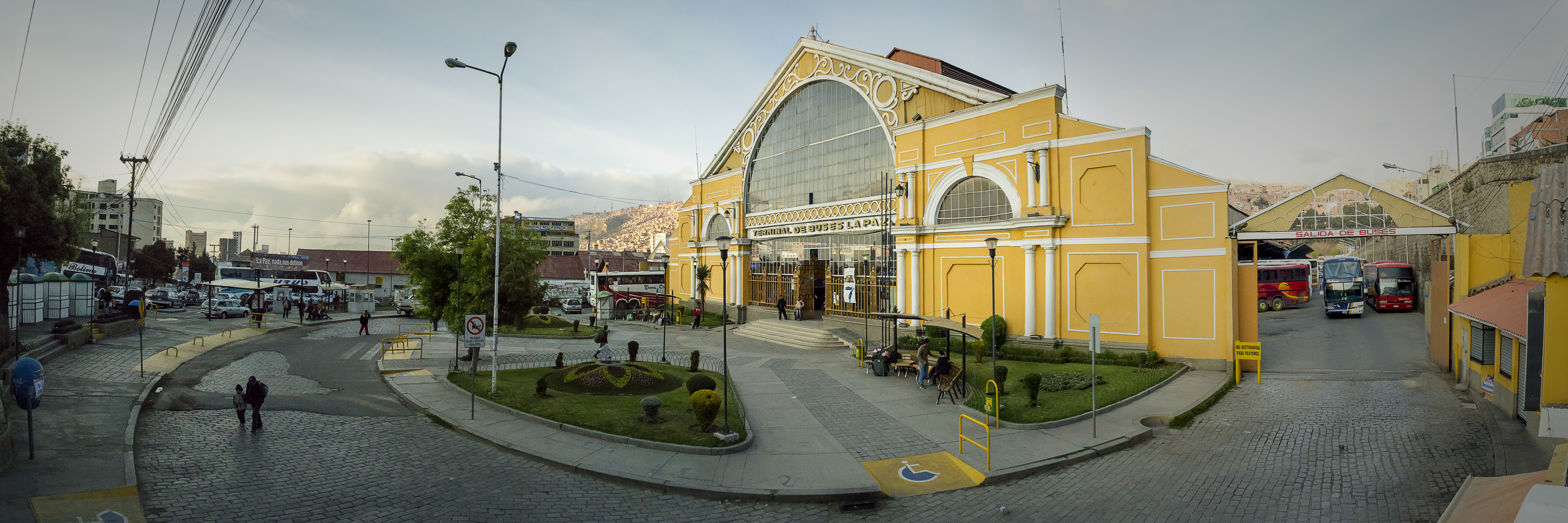 Terminal de Buses This medium shows the protected monument with the number L/00-002 in Bolivia.